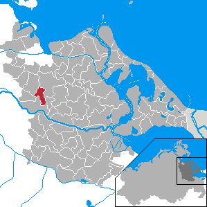 Kölzin, Landkreis Ostvorpommern, Mecklenburg-Vorpommern